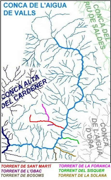 Mapa de la conca de l'Aigua de Valls (afluent del Cardener) en el qual s'hi han destacat els següents afluents: el Torrent de Sant Martí, el Torrent de la Foranca, el Torrent de l'Obac, el Torrent del Sisquer, el Torrent de la Solana i el Torrent de Bosoms.